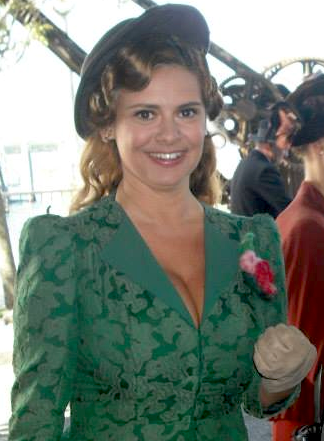 l'attrice Debora Caprioglio nell'agosto 2013 sul set del film "Il pretore" di Giulio Base.